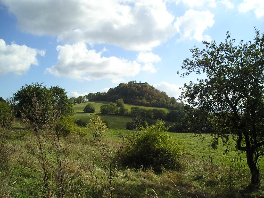 Zřícenina hradu Blansko nad levým břehem řeky Labe.